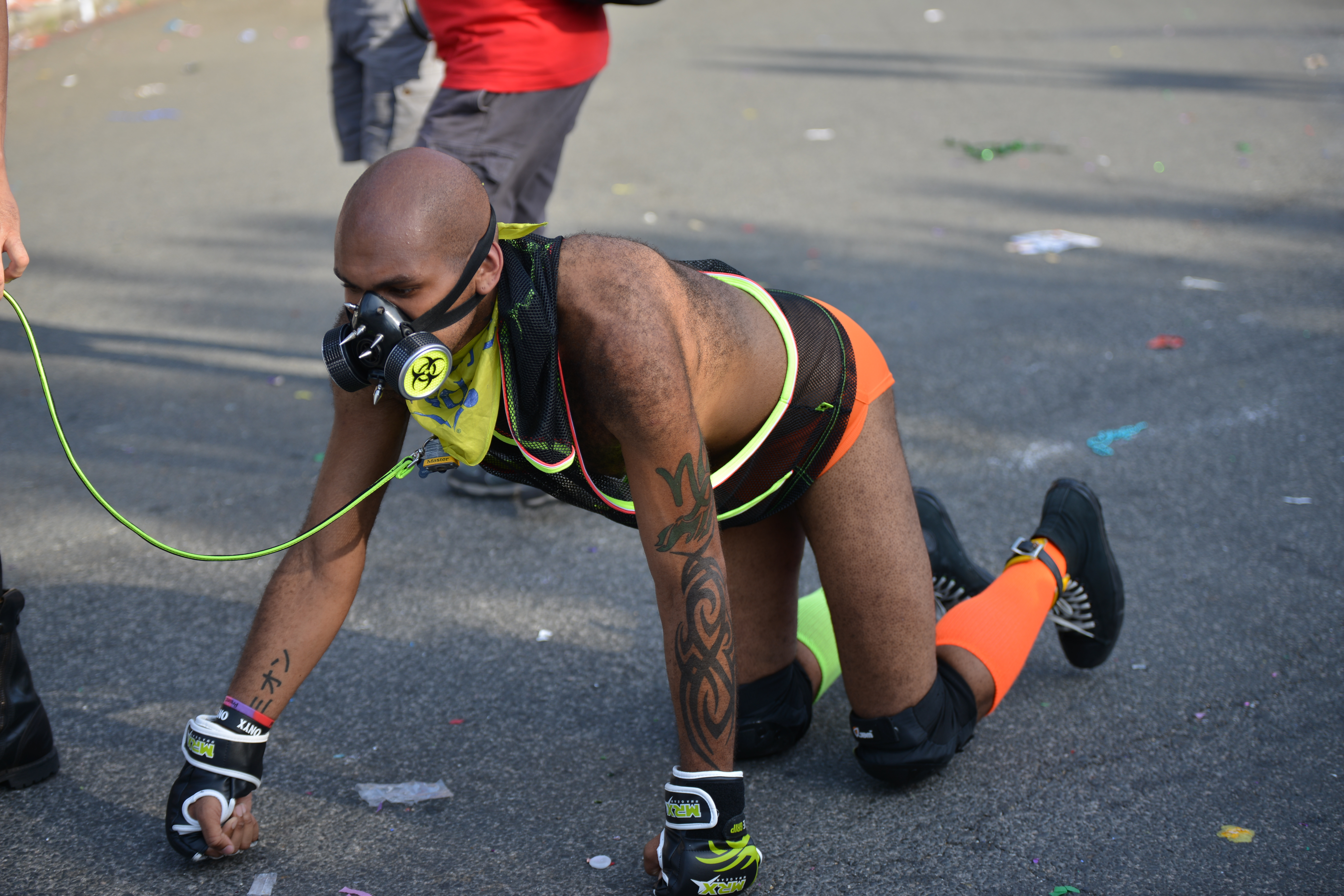 Capital Pride Parade DC 2016